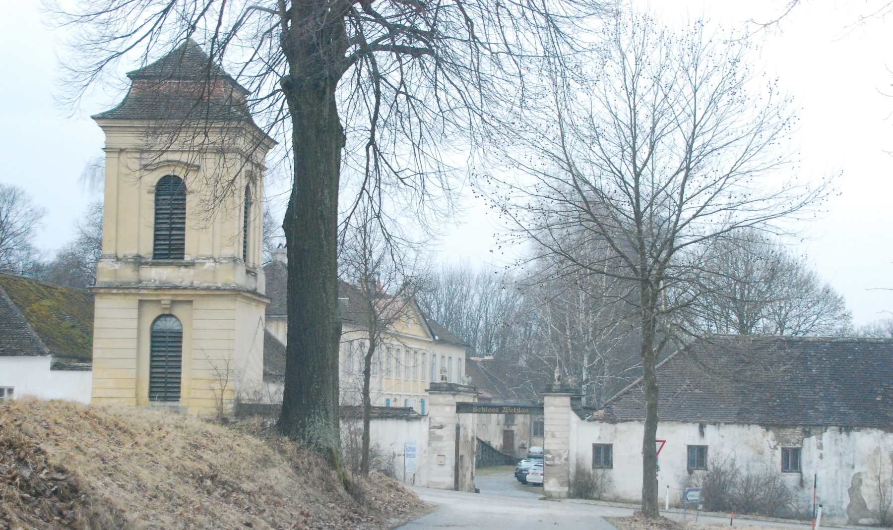 Schloss Wetzlas bei Wetzlas in Niederösterreich